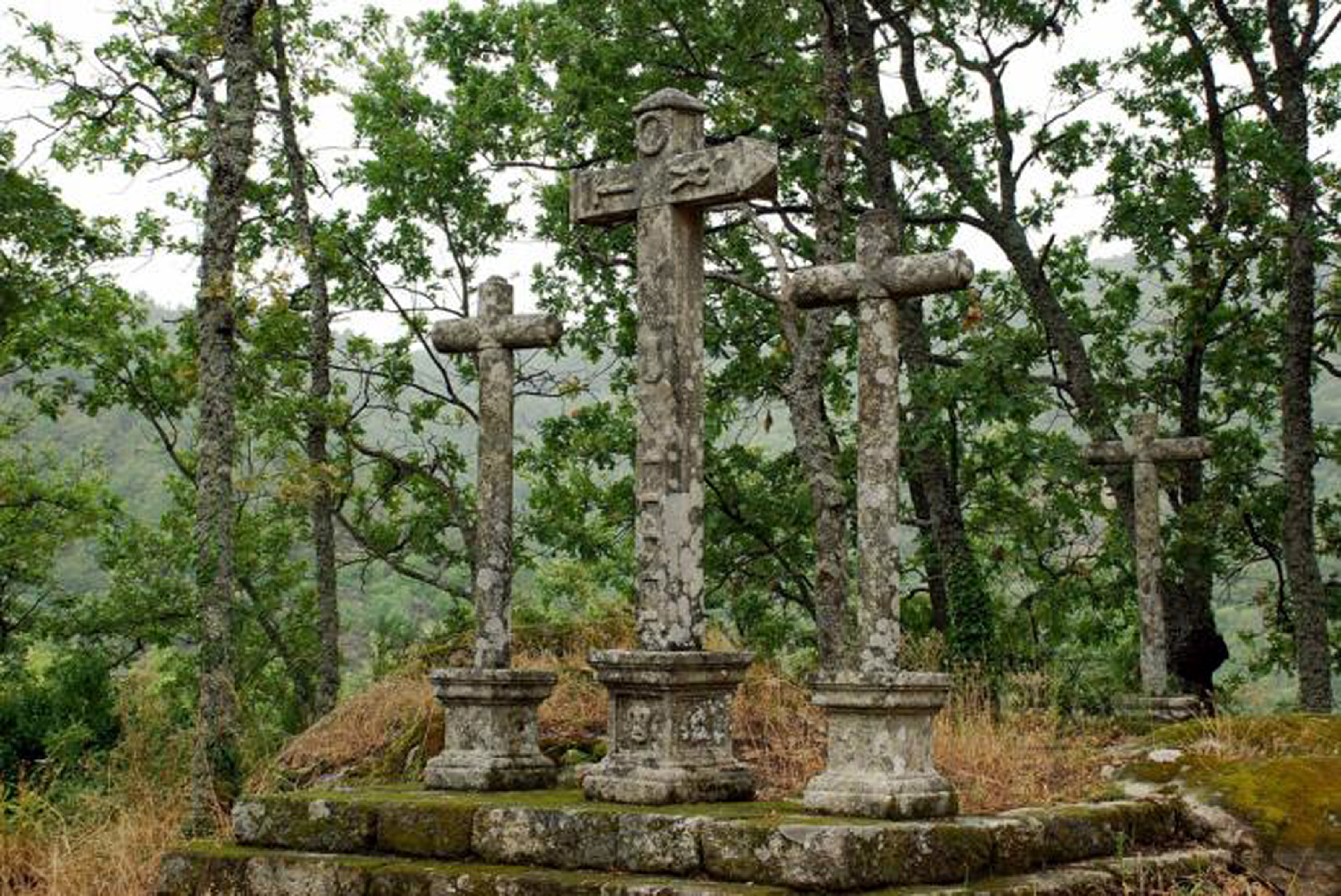 Precioso final del Viacrucis en Las Casas del Conde enclavado en un entorno natural que lo hace único.